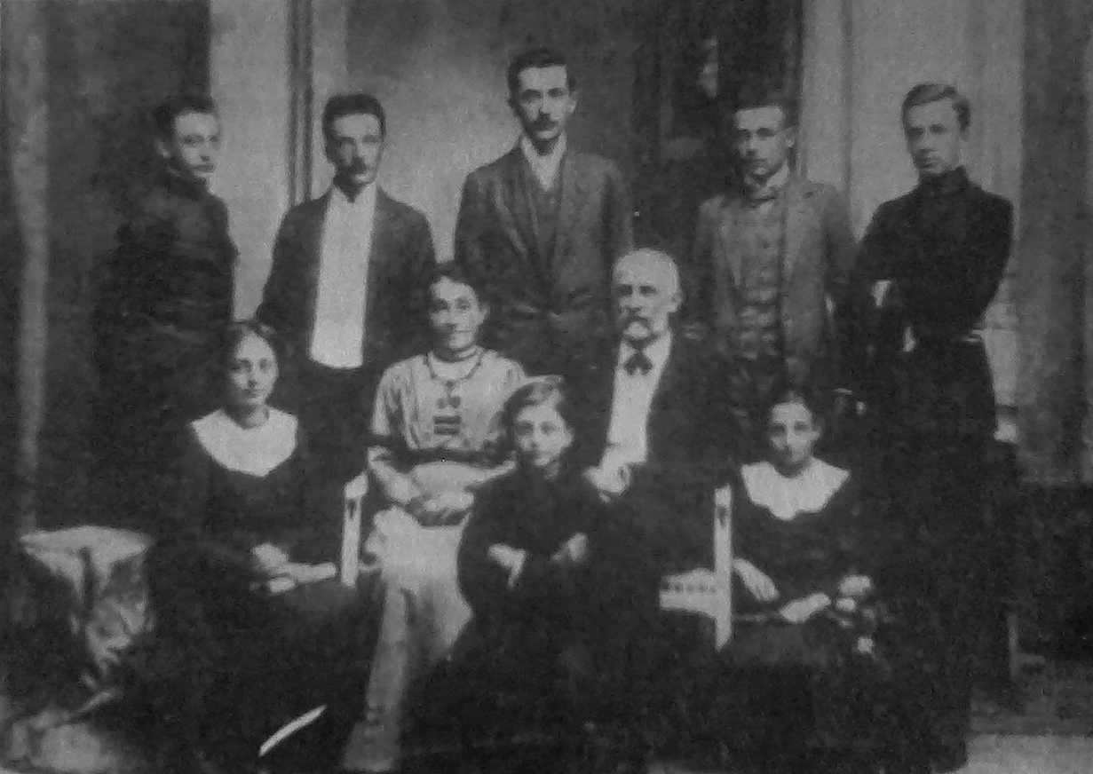 Rodzina Zaleskich w Sanoku (1906-1912 - na zdjęciu brak jest córki Zofii, żyjącej w latach 1903-1906, natomiast jest na zdjęciu Wilhelmina Zaleska, zm. 1912).